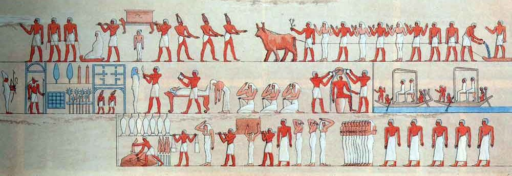 Zeichnung nach einem Wandrelief aus dem Felsengrab des Renni (EK7) in el-Kab, Ägypten